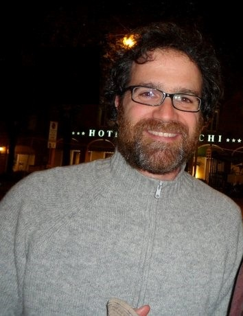 Fausto Maria Sciarappa.